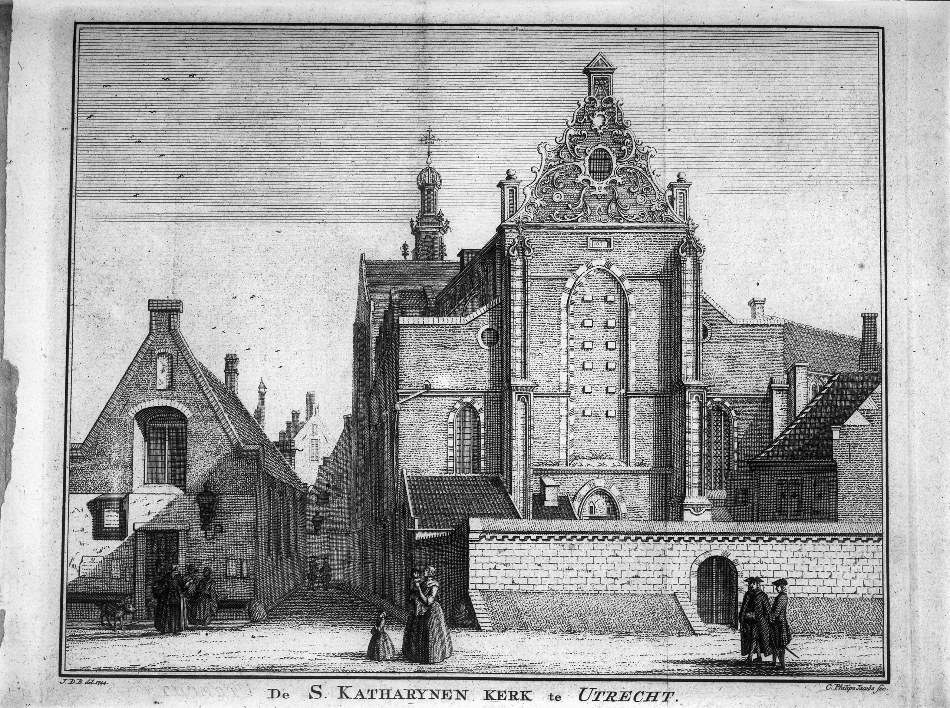 Catharijne Kerk: kerk naar gravure in: Tegenwoordige Staat der Verenigde Nederlanden